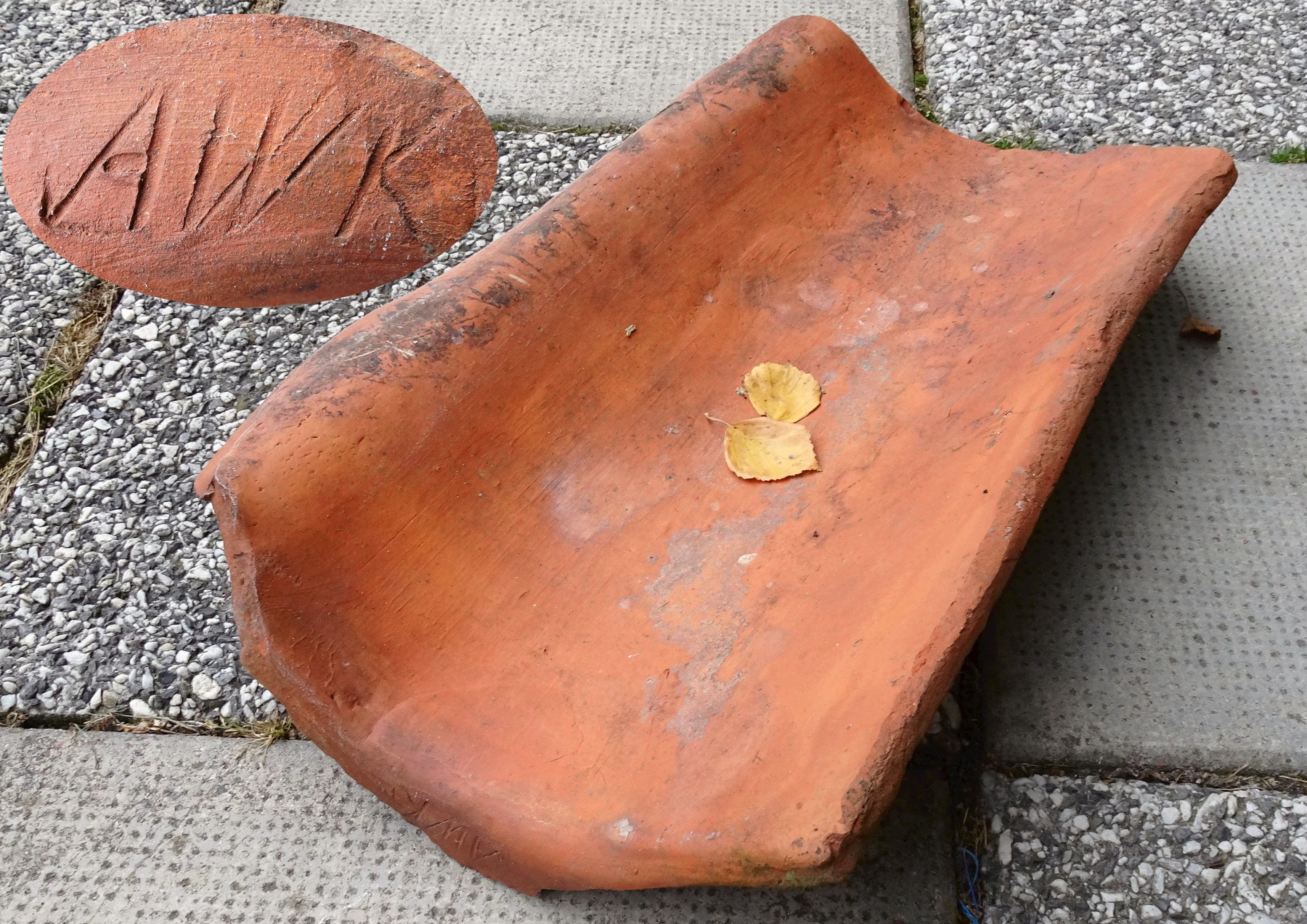 Takpanna från Kalkuddens tegelbruk med märkning AWK som står för Anders von Wahrendorff, Kalkudden